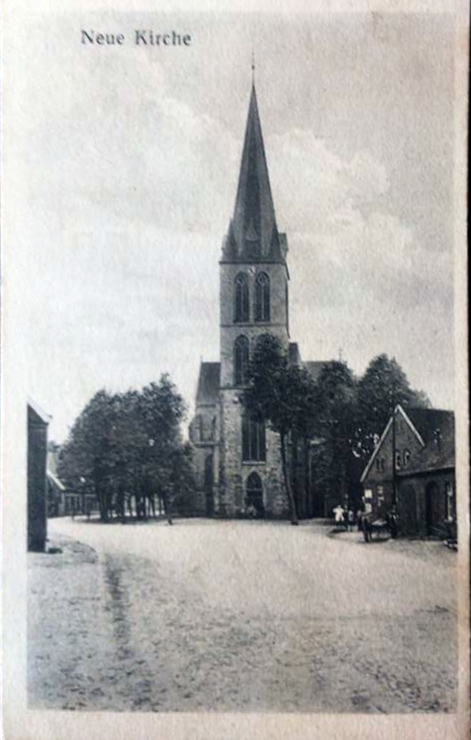 Pfarrkirche St. Johannes Baptist, vor 1934